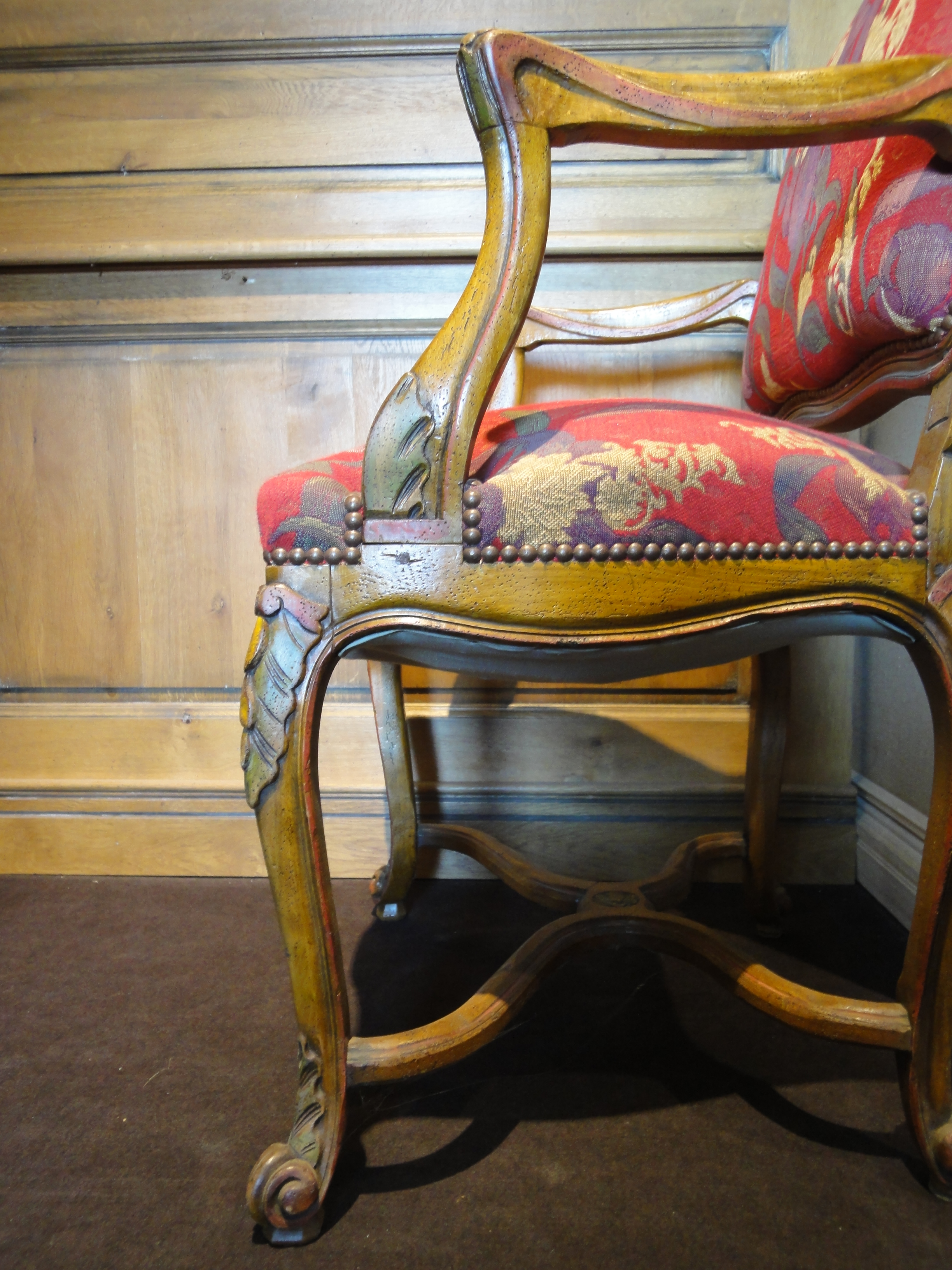 Style Régence, réalisé par les Ateliers Allot Frères.